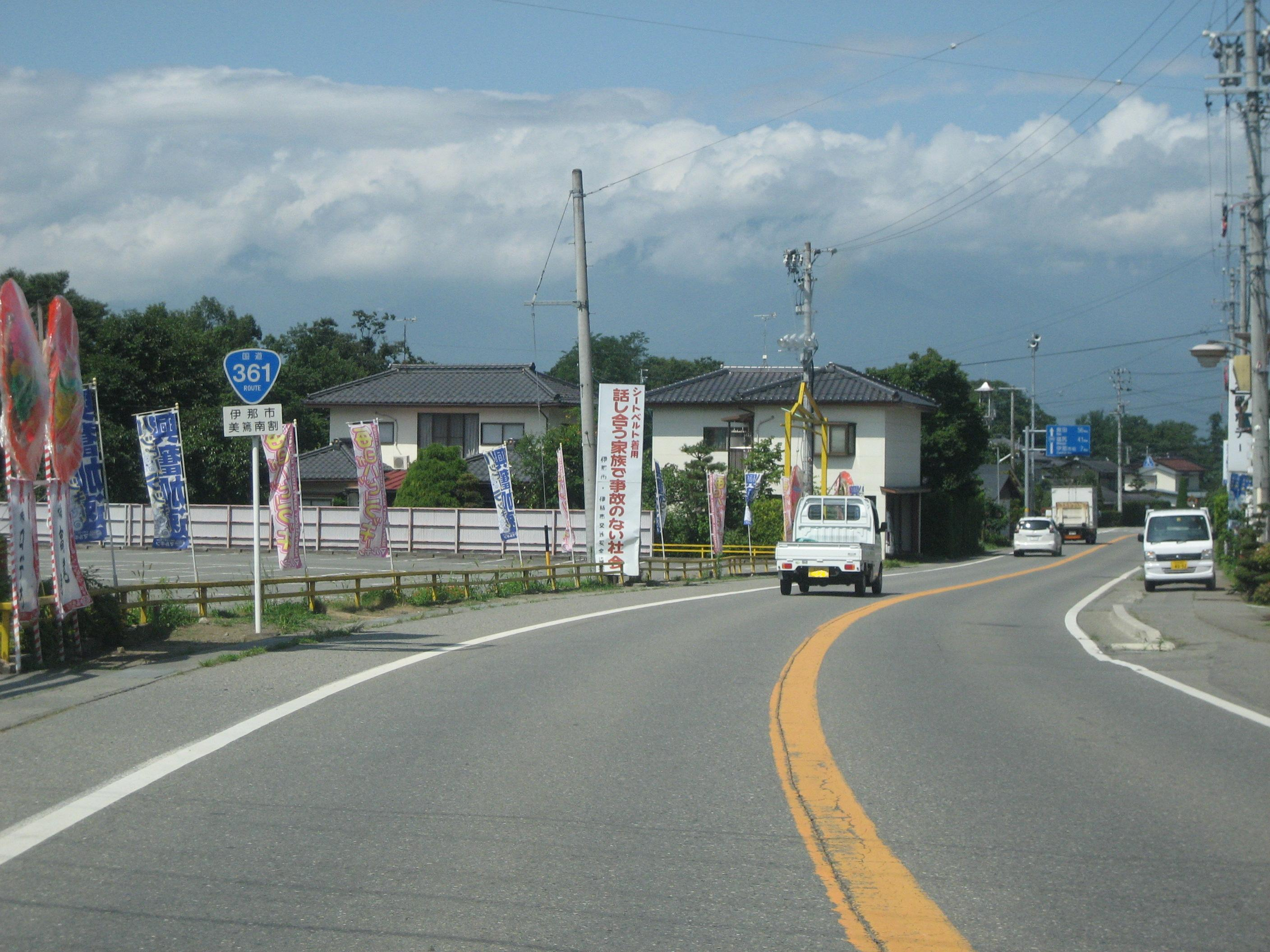 国道361号線長野県伊那市内